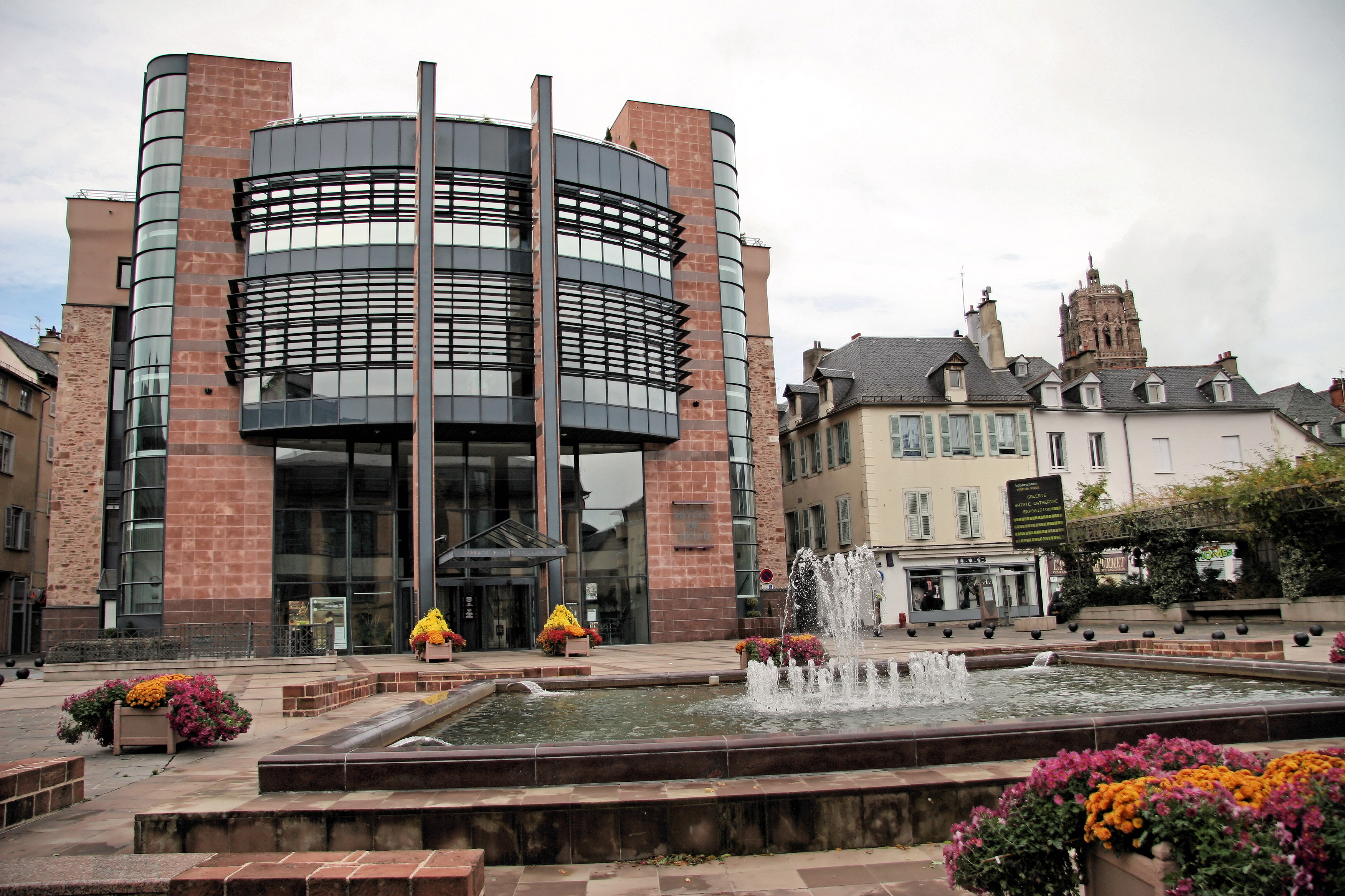 Hôtel de Ville de Rodez (Aveyron, France).